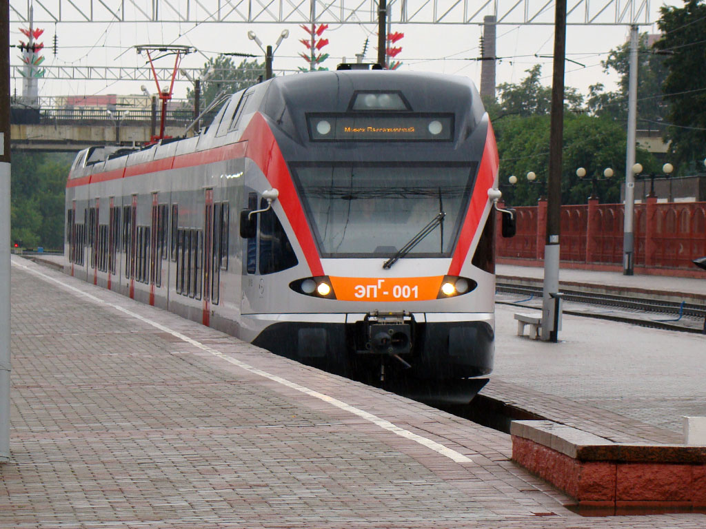 Электрацягнік Менскіх гарадзкіх ліній Stadler FLIRT на чыгуначным вакзале Менск-ПасажырскіUnknown